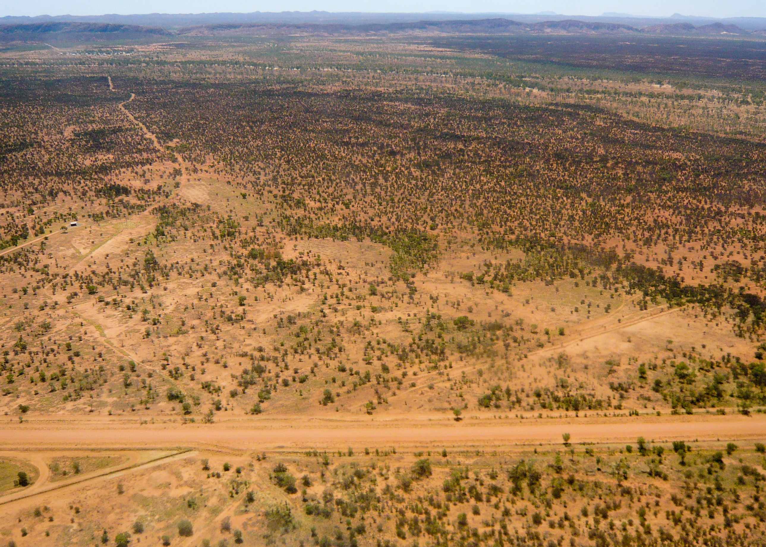 Outback just leaving ASP